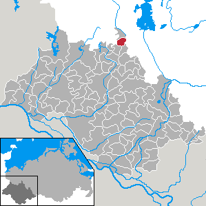 Klein Rogahn in Mecklenburg-Vorpommern - district Ludwigslust